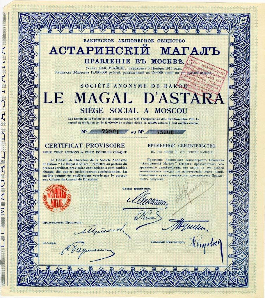 Временное свидетельство на предъявителя на сто акций по сто рублей каждая Бакинского акционерного общества "Астаринский Магал" с основным капиталом в 15 млн. руб. Москва, 1916 г.